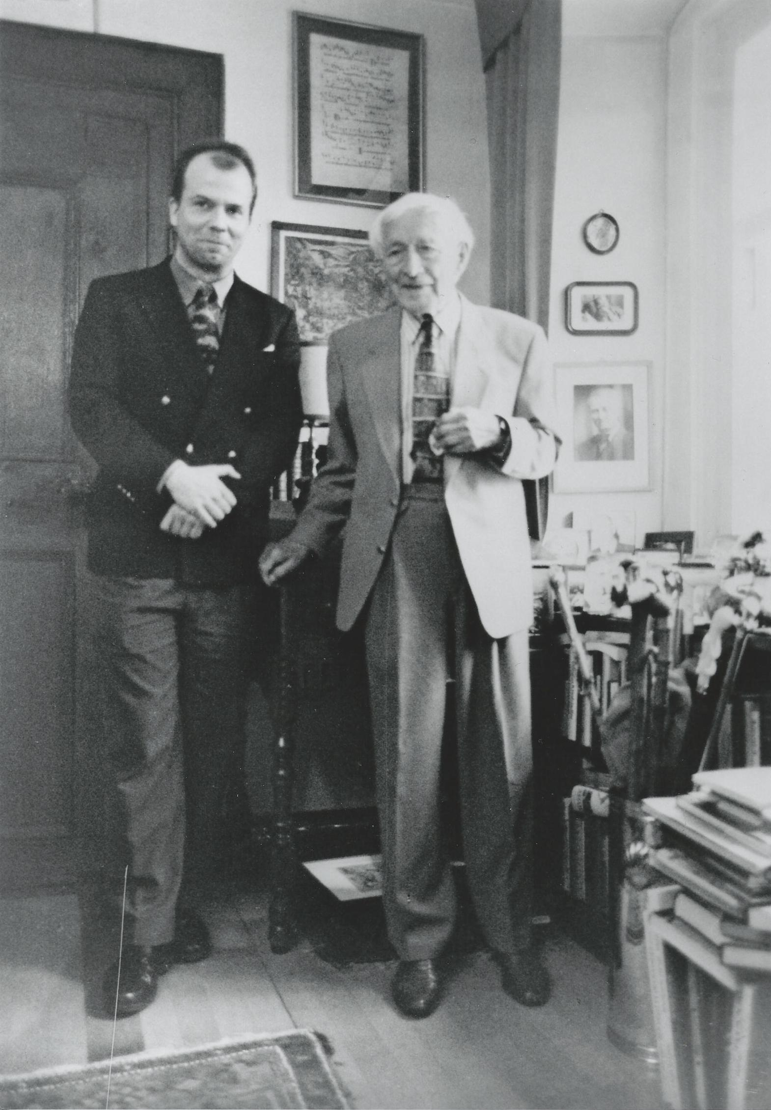 Ernst Jünger & Stephan Reimertz in der Oberförsterei in Wilflingen, 20. März 1997